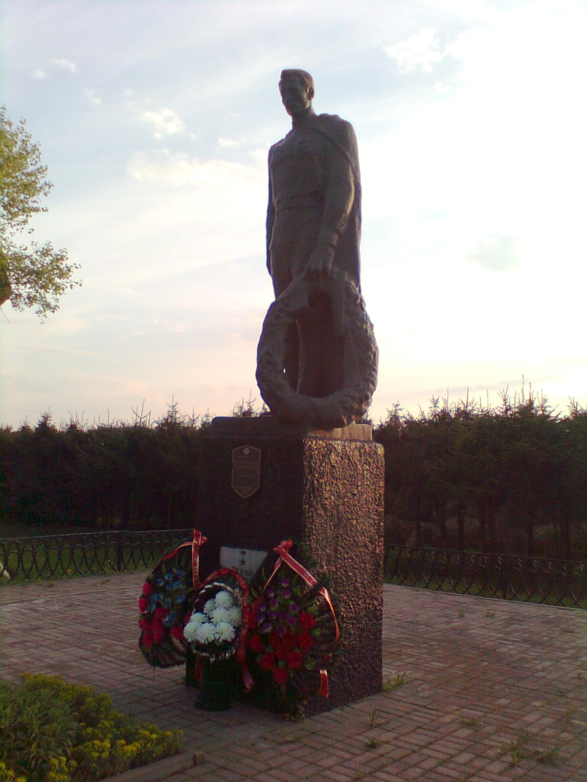 Похоронен в братской могиле возле деревни Покрашево Слуцкого района, на трассе Минск - Слуцк.